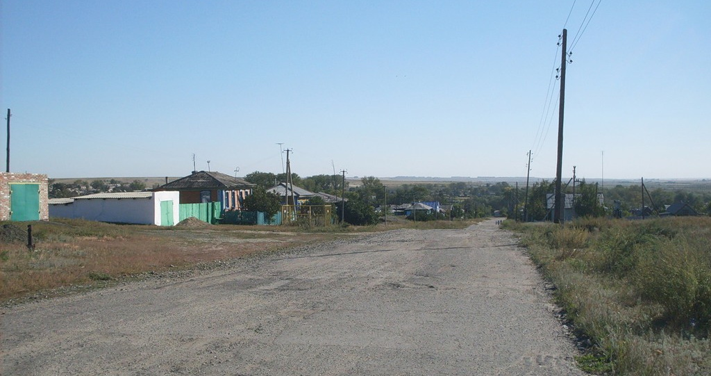 Улица поселка Ключевка (Троицкий район)